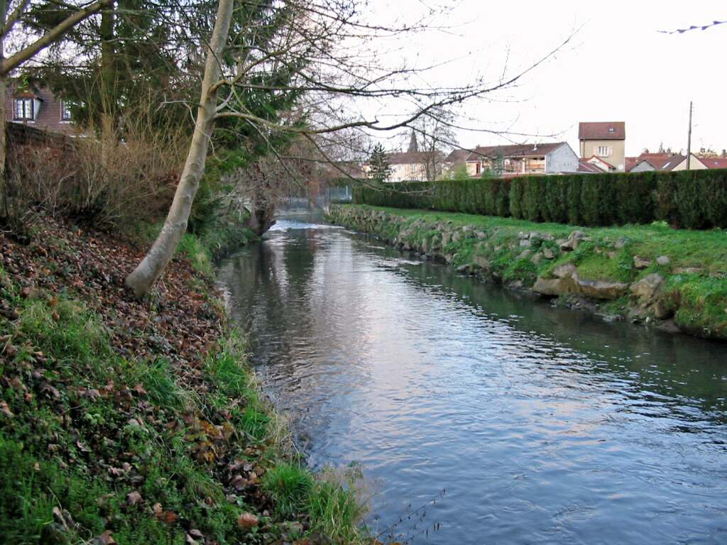 La Mauldre à Aulnay-sur-Mauldre (Yvelines) Photo JH Mora ; janvier 2005